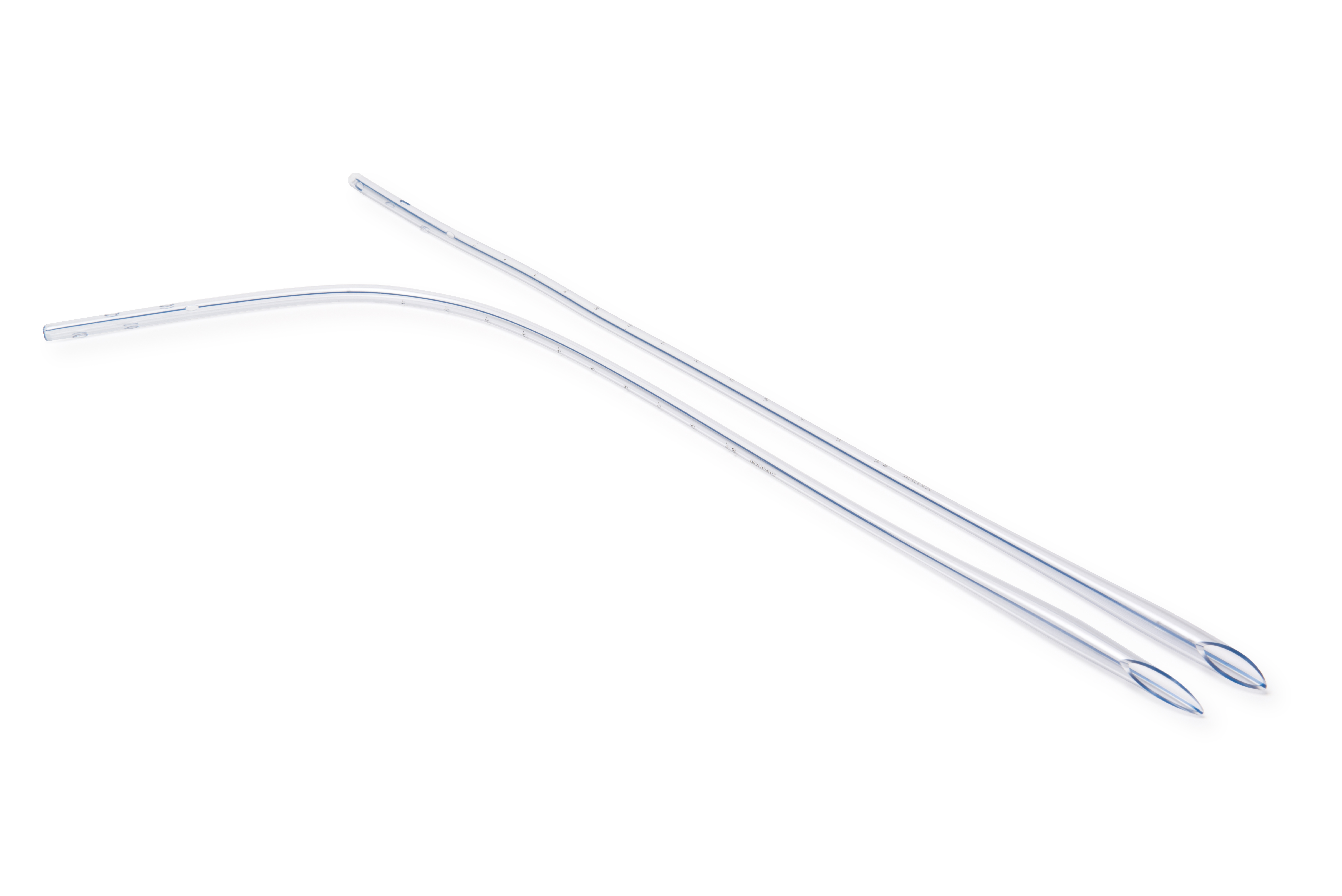 Thoraxkatheter